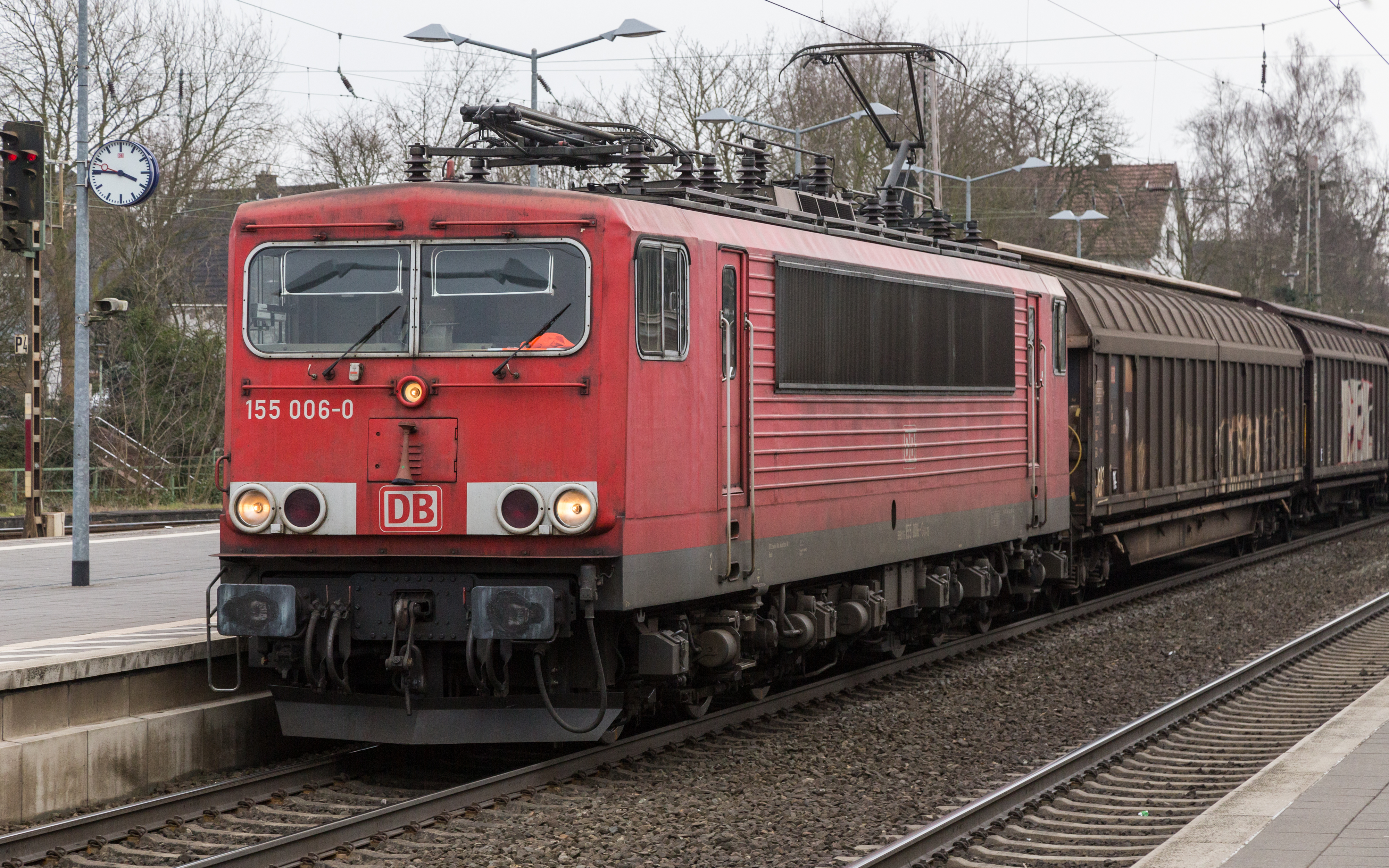 DB 155 006-0 führt einen Güterzug durch Verden/Aller